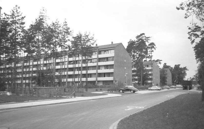 Karlsruhe: Wohnungsbau und Siedlungen